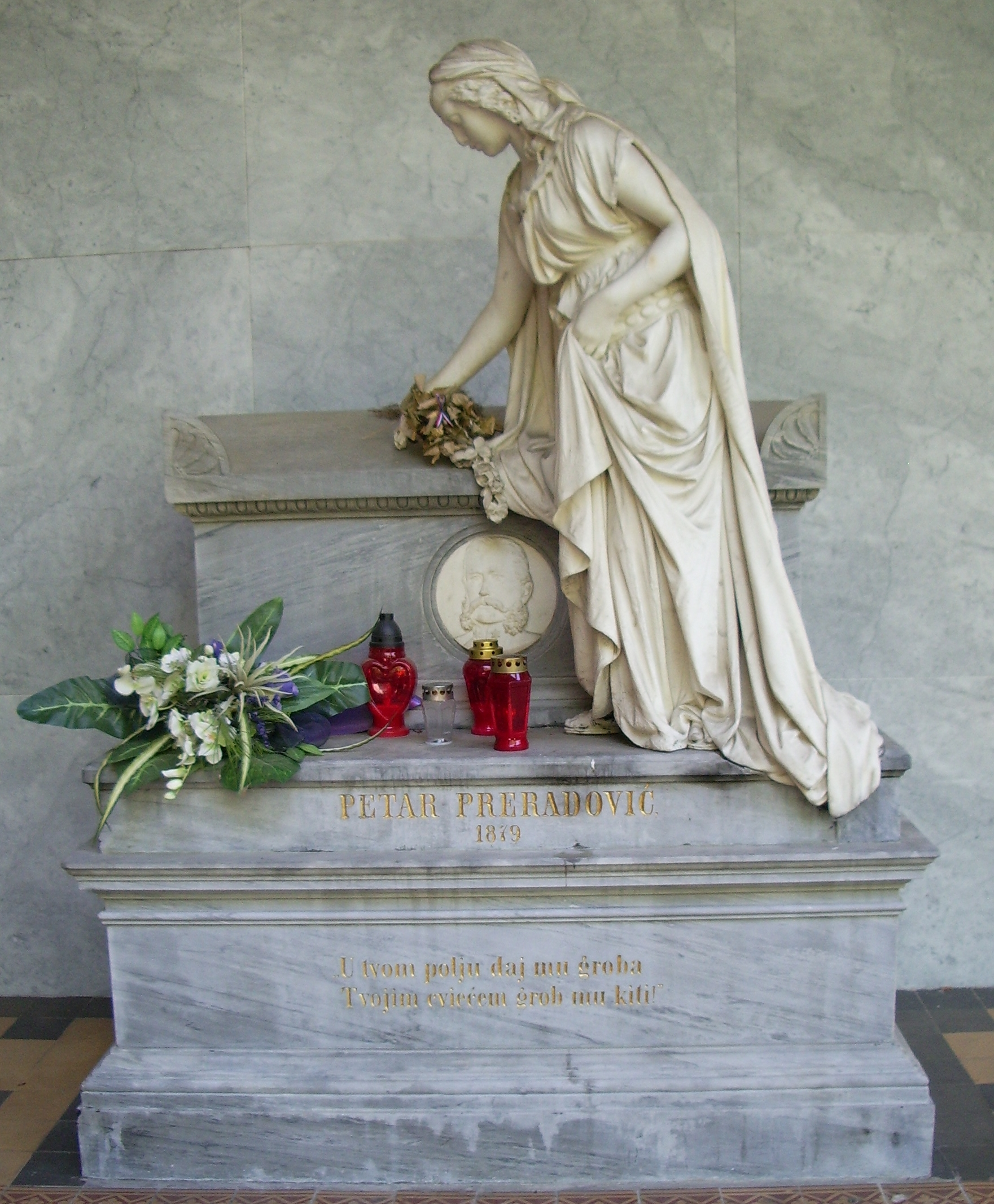 spomenik Petru Preradoviću na Mirogoju